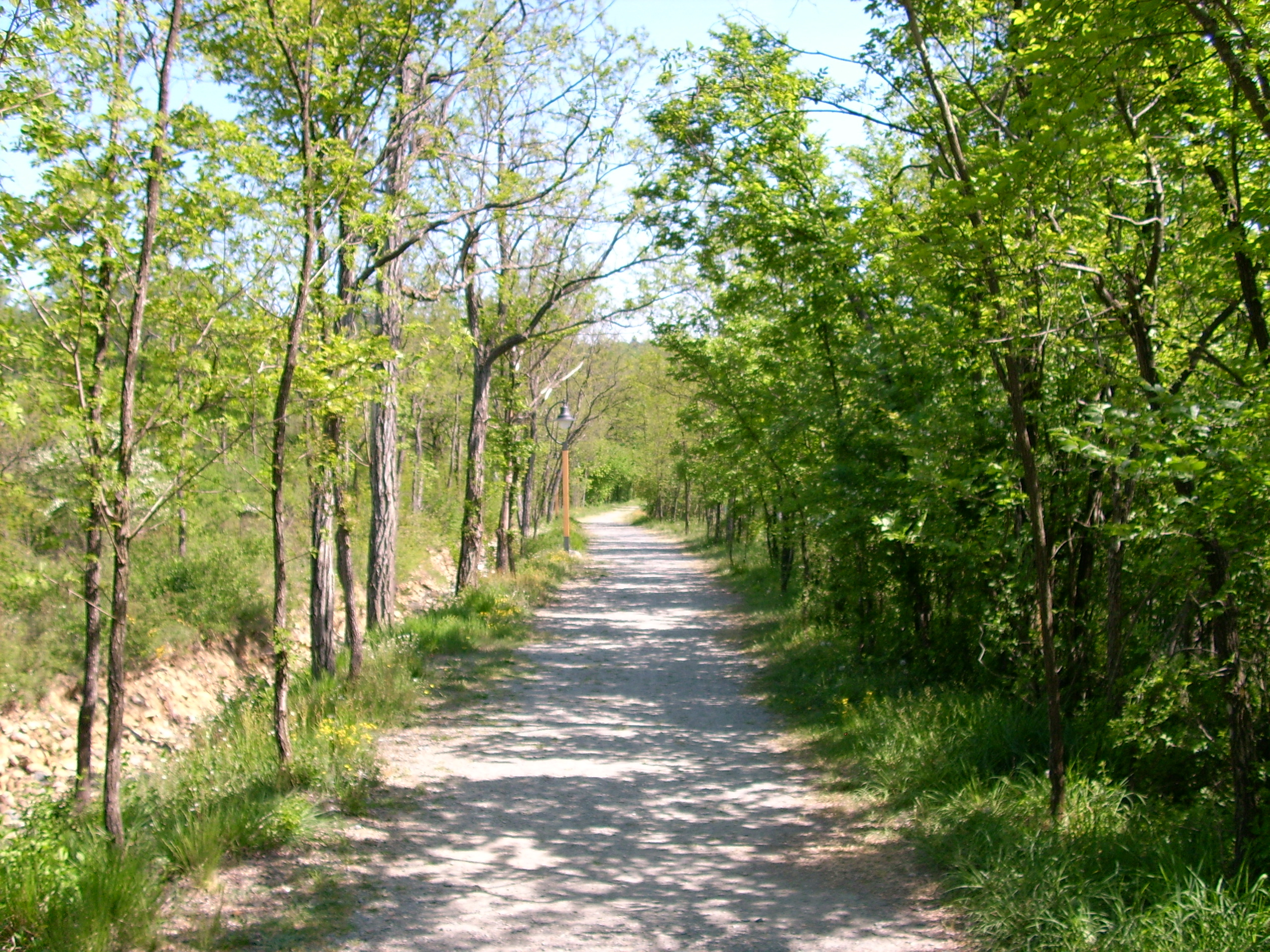 Sentiero per la Badia di Tiglieto, Liguria, Italia